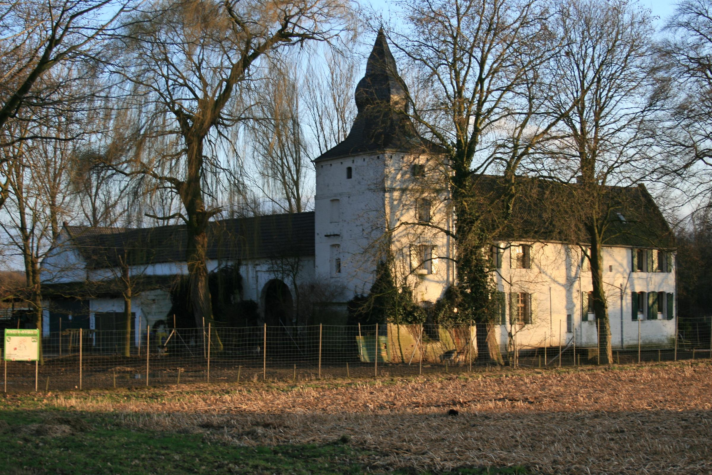 Haus Zumdahl an der L 42, Denkmal Nr. 41 in Geilenkirchen-Nirm